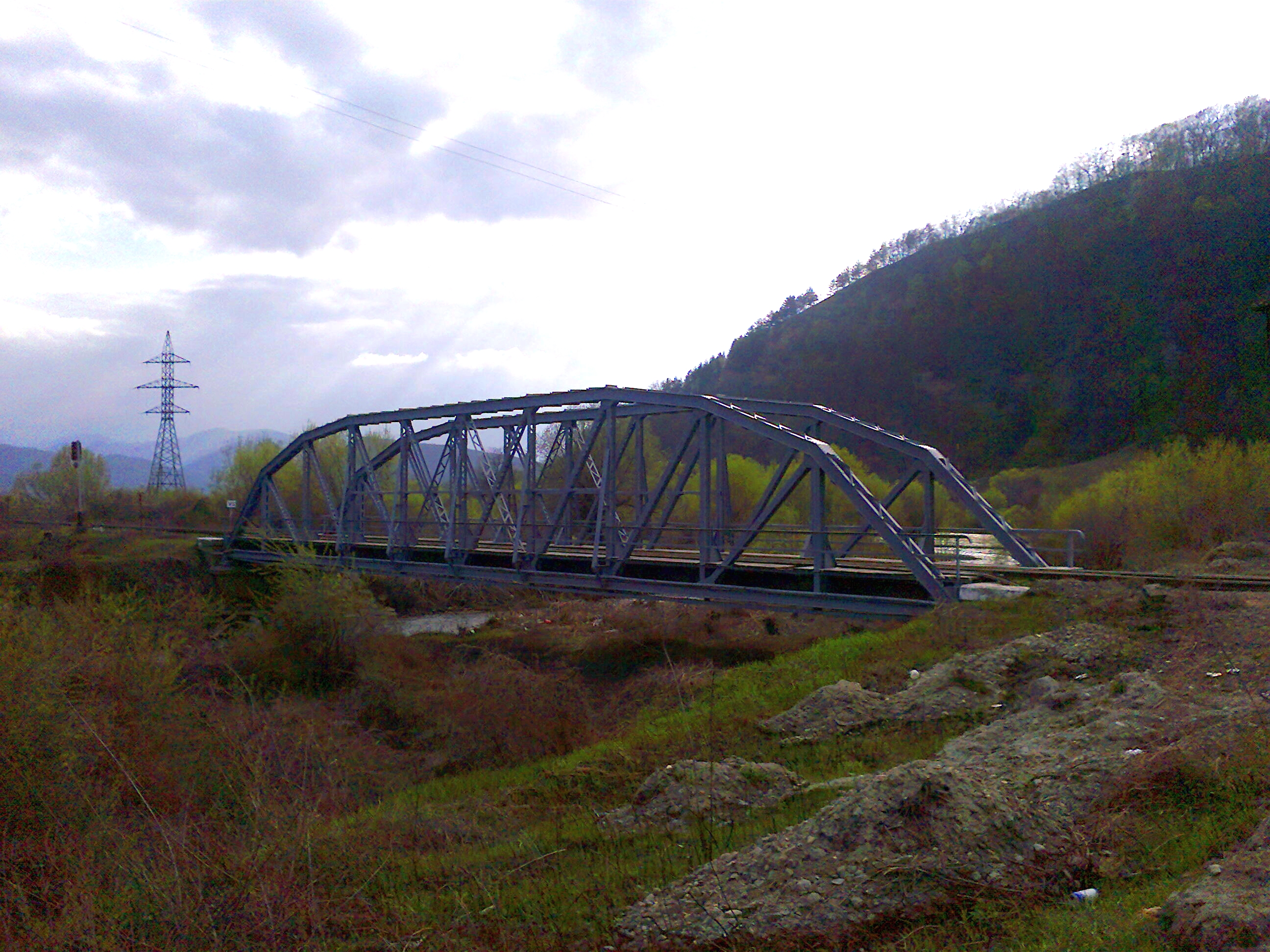 Podul CFR peste raul Sebes, Sibiu.